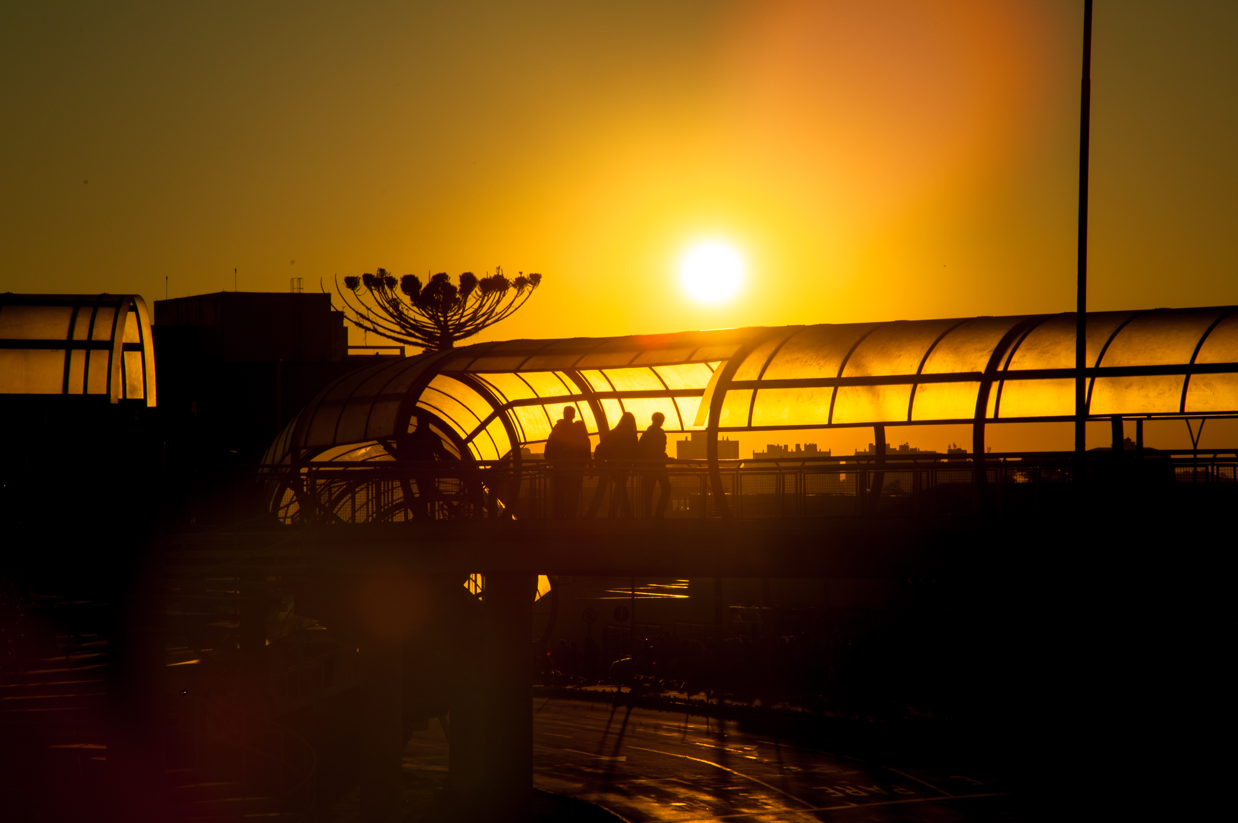 O pôr do sol é um espetáculo lindo na Universidade de Caxias do Sul. Esta instituição é comunitária e constitui um parque lindo em nossa cidade, pois possui inúmeros lugares para que os moradores da cidade possam usufruir em seus momentos de lazer.